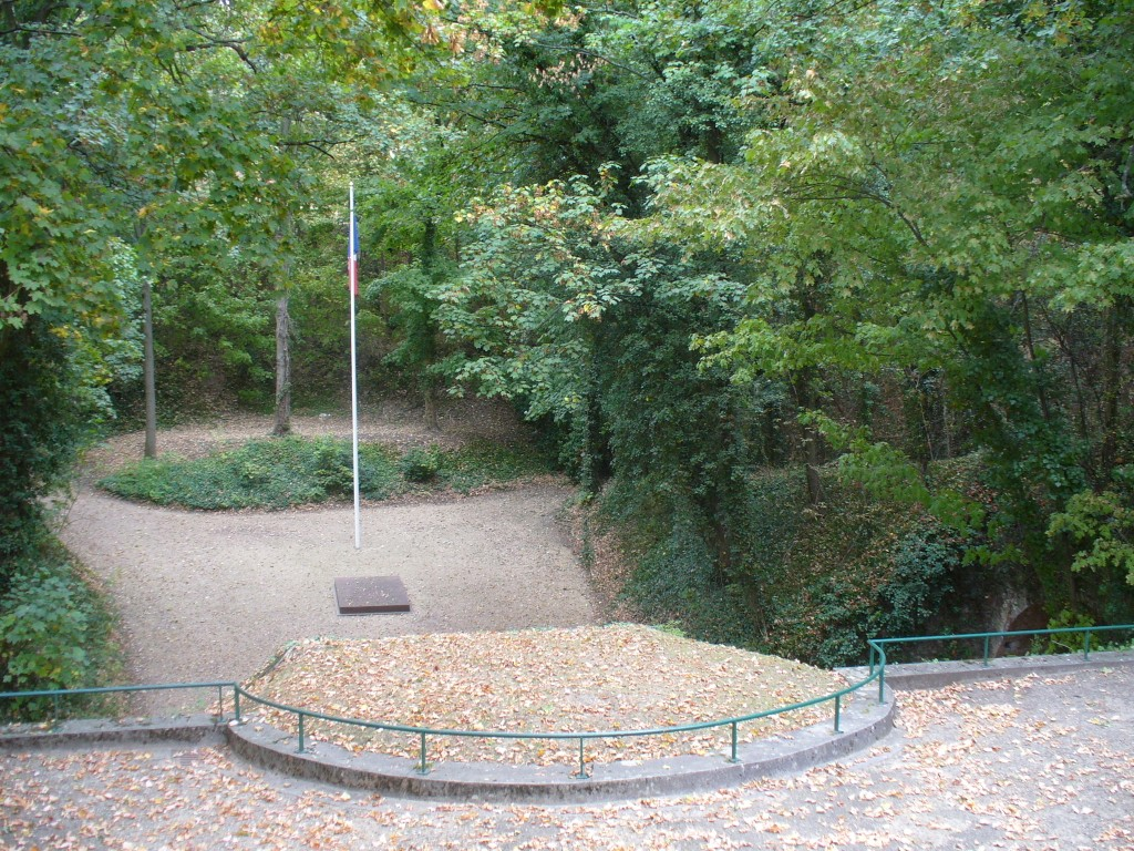 Clairière, Mont-Valérien, Suresnes.